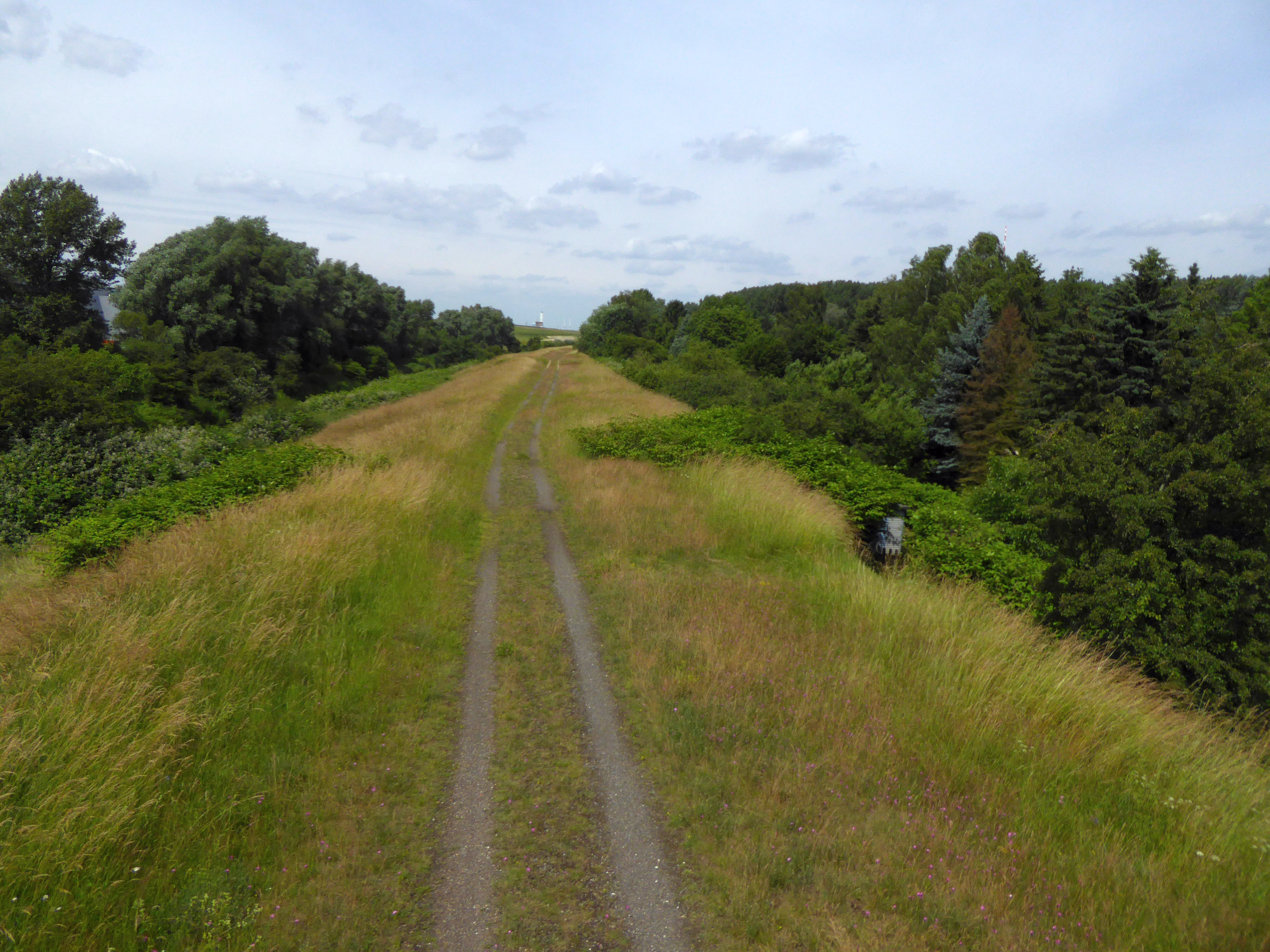 Alter Billwerder Bahndamm (Blickrichtung Westen)